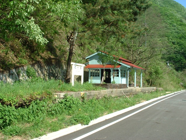 同和鉱業片上鉄道 苦木駅跡 岡山県和気郡佐伯町（現・和気町）苦木